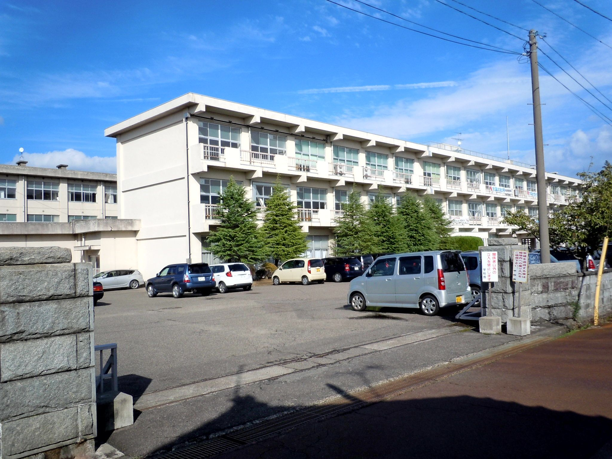 新潟県立吉田高等学校